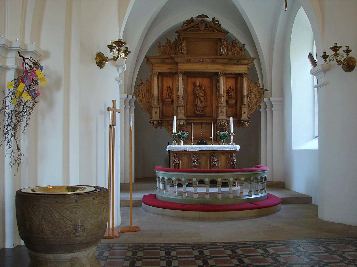 Alteravle, Höör Kirke, Skåne, Sverige